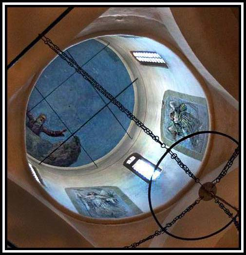 Изображение Саваофа в окружении херувимов кисти Шумова